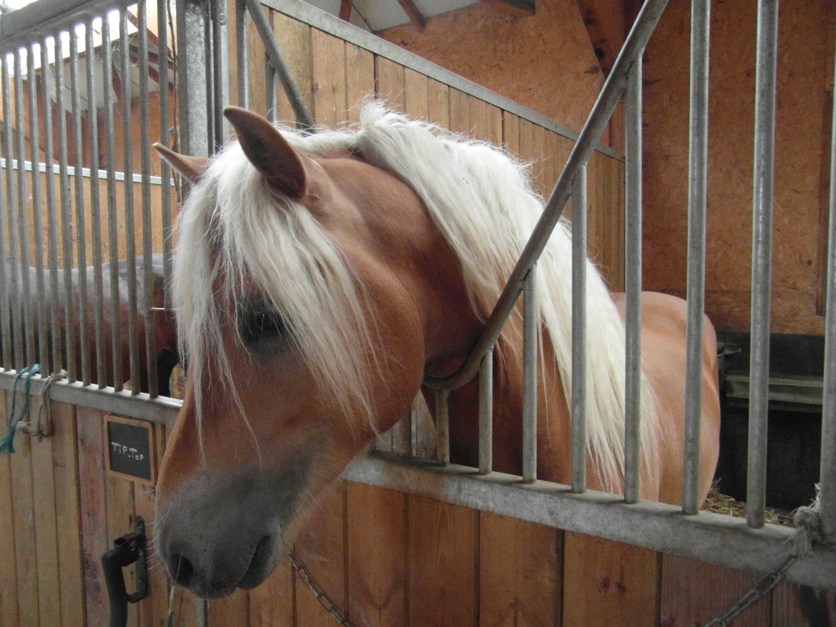 Jument Haflinger dans son box